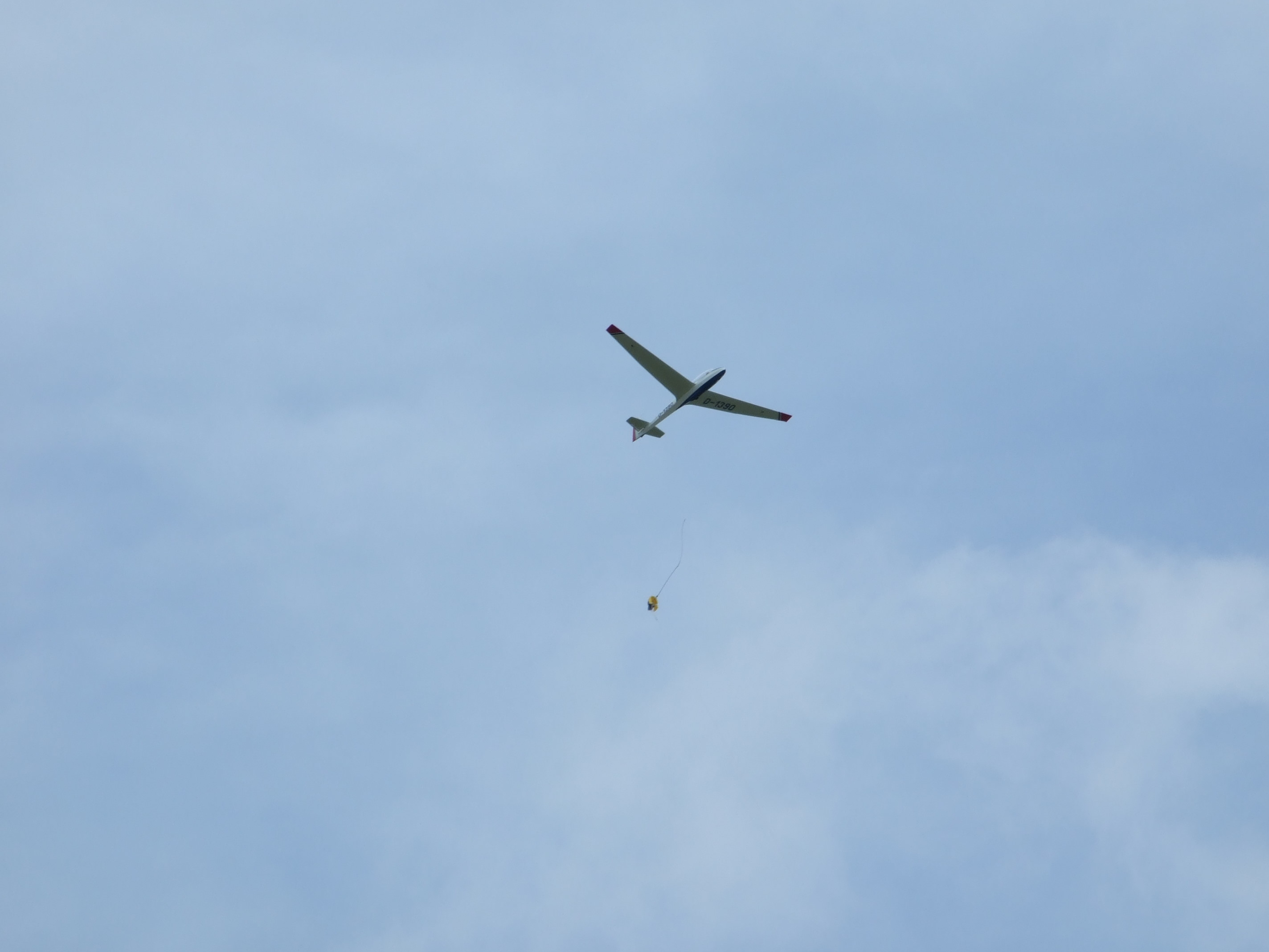 Segelflugzeug beim Windenstart vom Flugplatz Anspach nach dem Ausklinken des Schleppseils